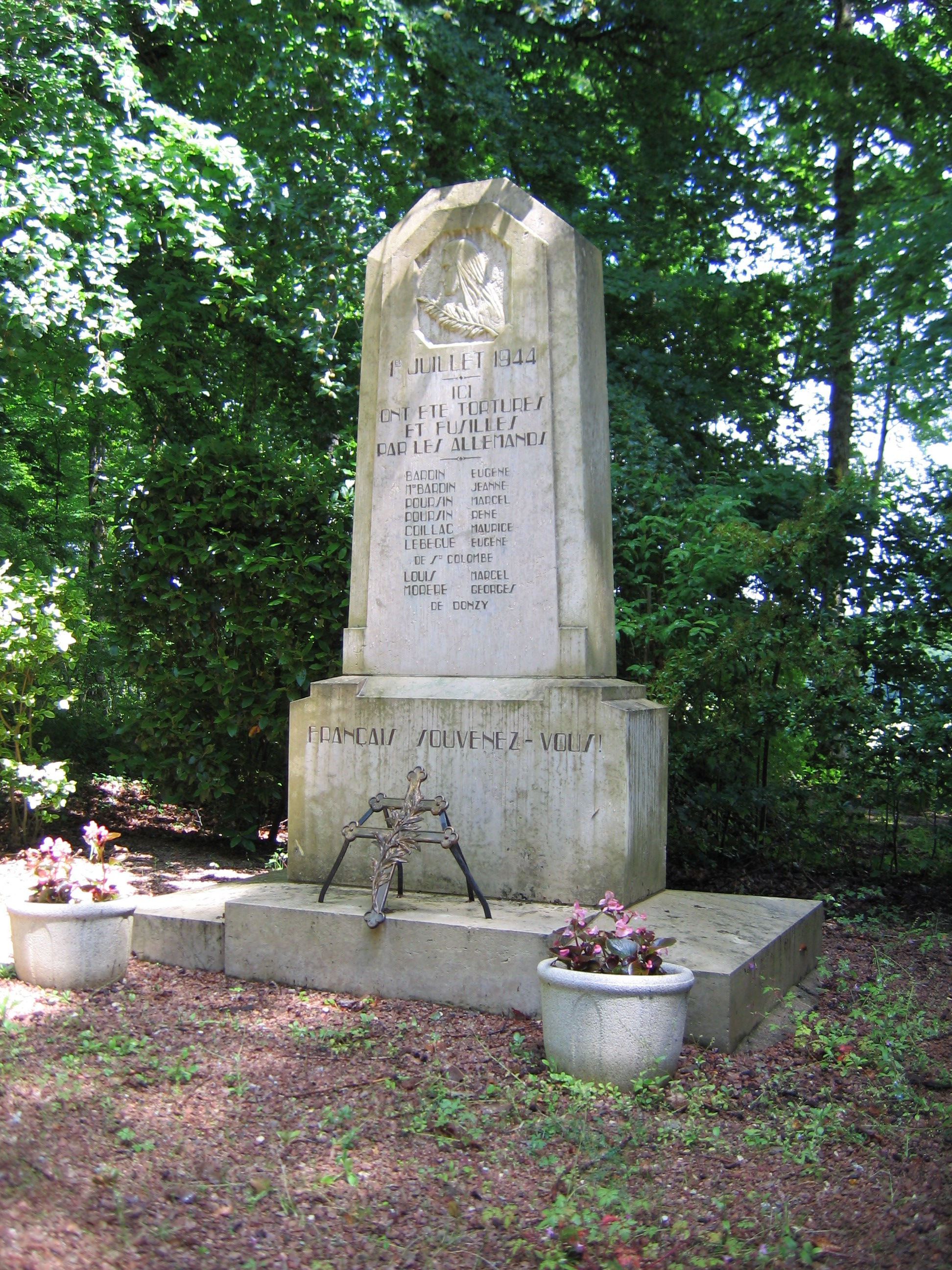 Monument commémorant le massacre de civils le 1er juin 1944 par de soldats allemands en représailles à la suite d'un attentat qui a couté la vie à un soldat allemand.